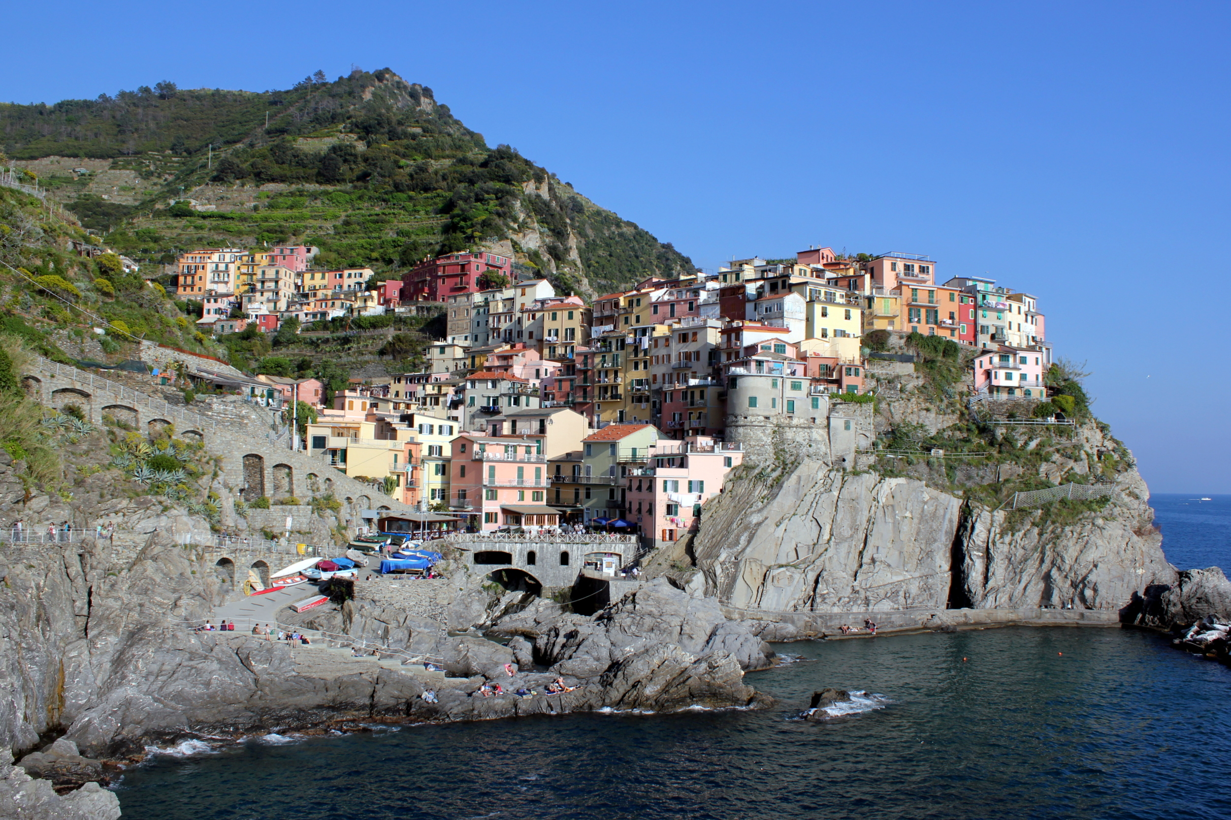 Der Ort Manarola in der Cinque Terre, Italien.